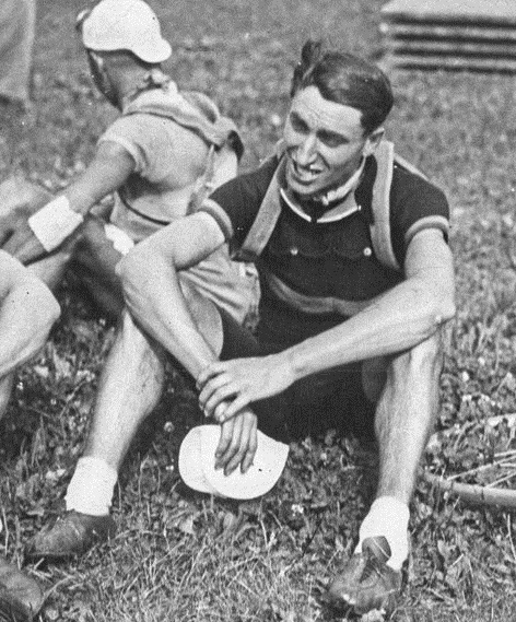 Tour de France 1936, 19e étape La Rochelle-La Roche sur Yon le 31 juillet : La Roche-sur-Yon, Marcel Kint (équipe de Belgique) vainqueur de l'étape